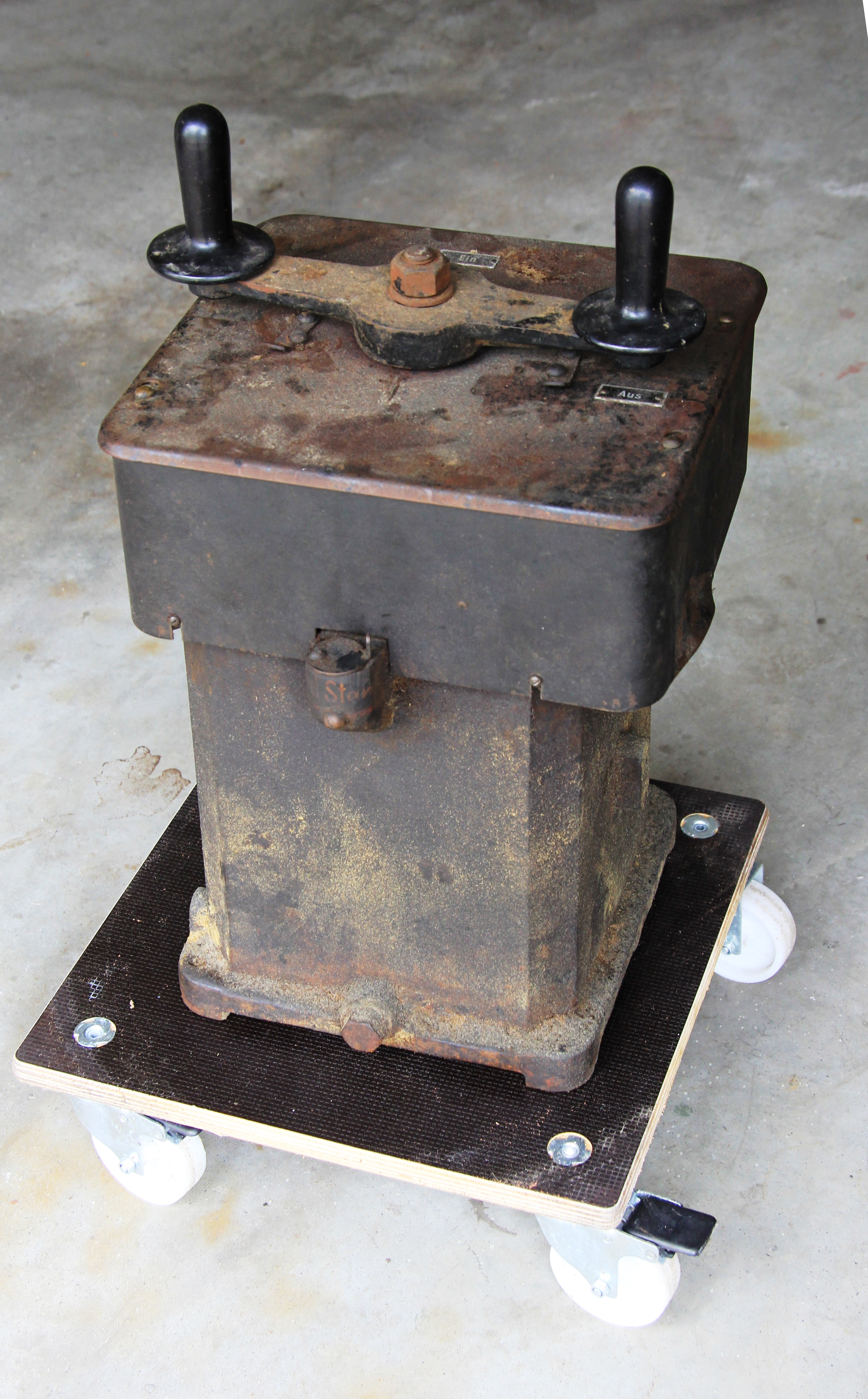 Historischer Anlasswiderstand aus den Siemens-Schuckert-Werken, wahrscheinlich 1920er-Jahre. Für Schleifringläufermotoren mit etwa 13 bis 15 kW Leistung. Abmessungen: 30 x 30 x 52 cm, etwa 40 kg schwer. Ölgekühlt.